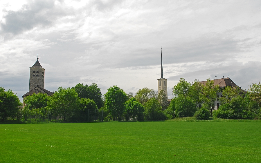 katholische und evangelisch-reformierte Kirche von Derendingen